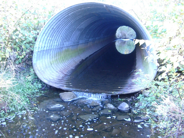 Photo: Boldie Vandringshinder för fisk